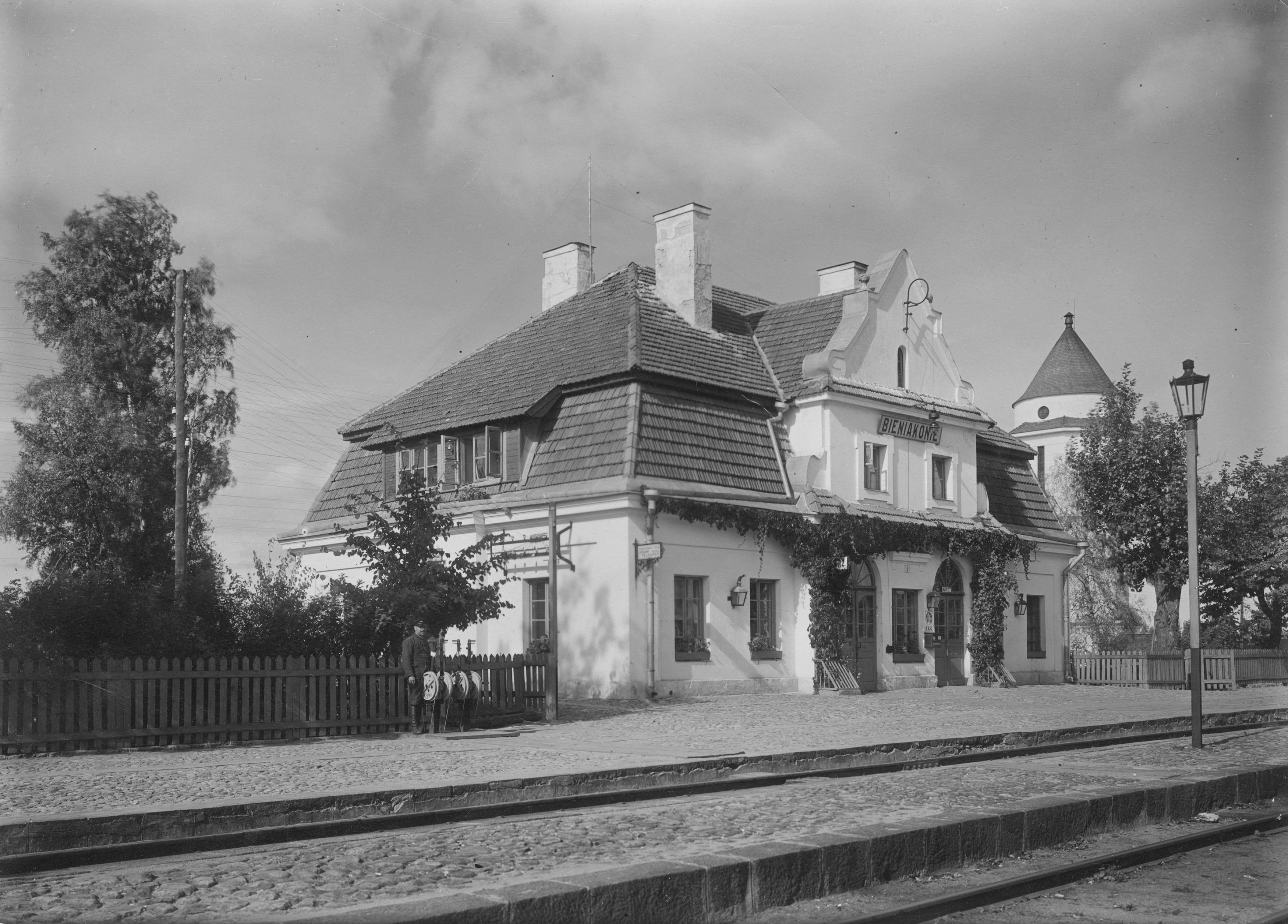 Беларуская (тарашкевіца): Беняконі (Bieniakoni), вуліца Вакзальная (vulica Vakzalnaja). Чыгуначная станцыя